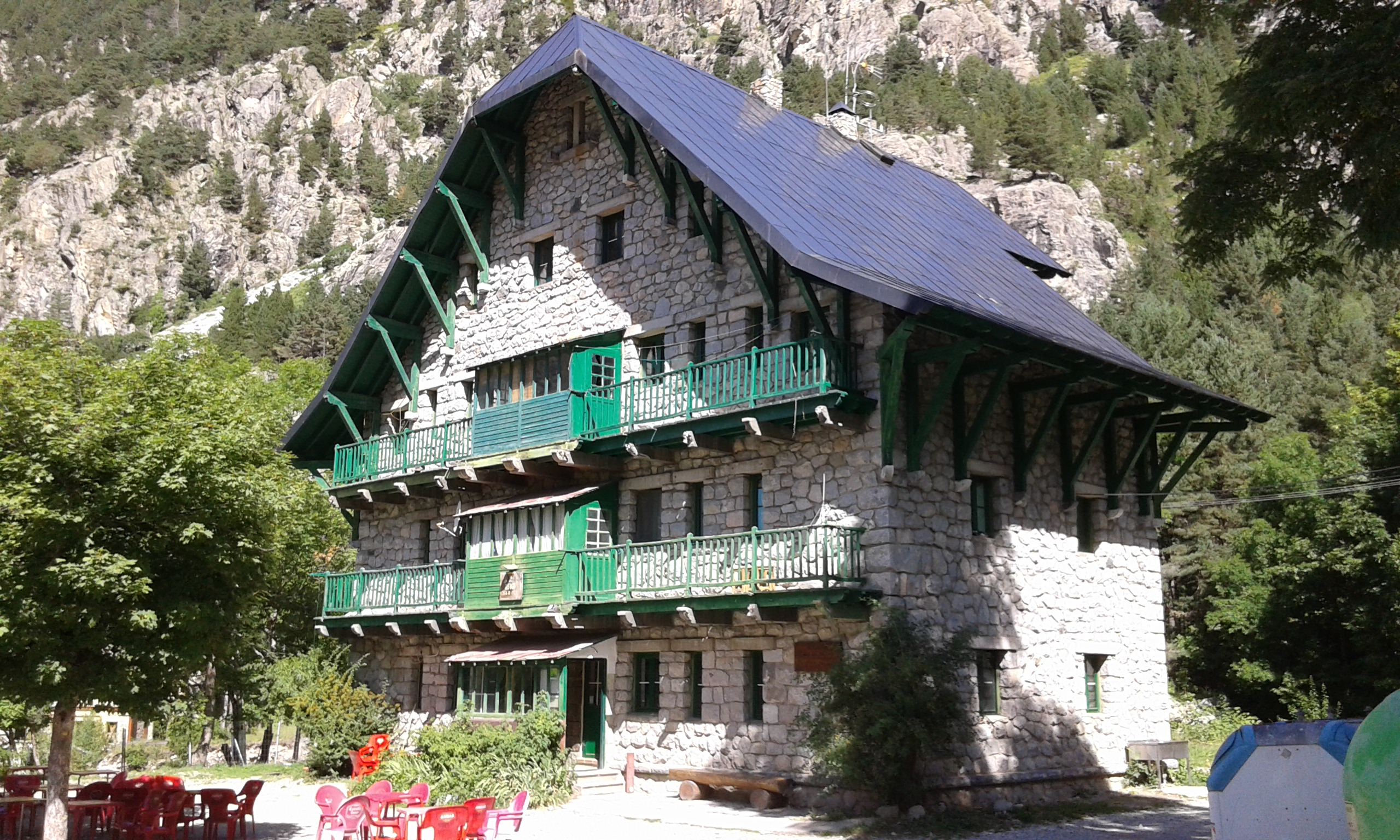 Refugi Casa de Piedra